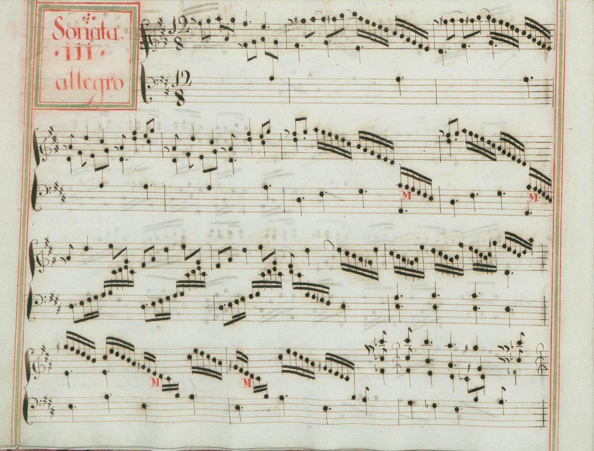 La sonate K. 45, telle qu'elle se présente dans le manuscrit de Venise, volume XIV no. 3.